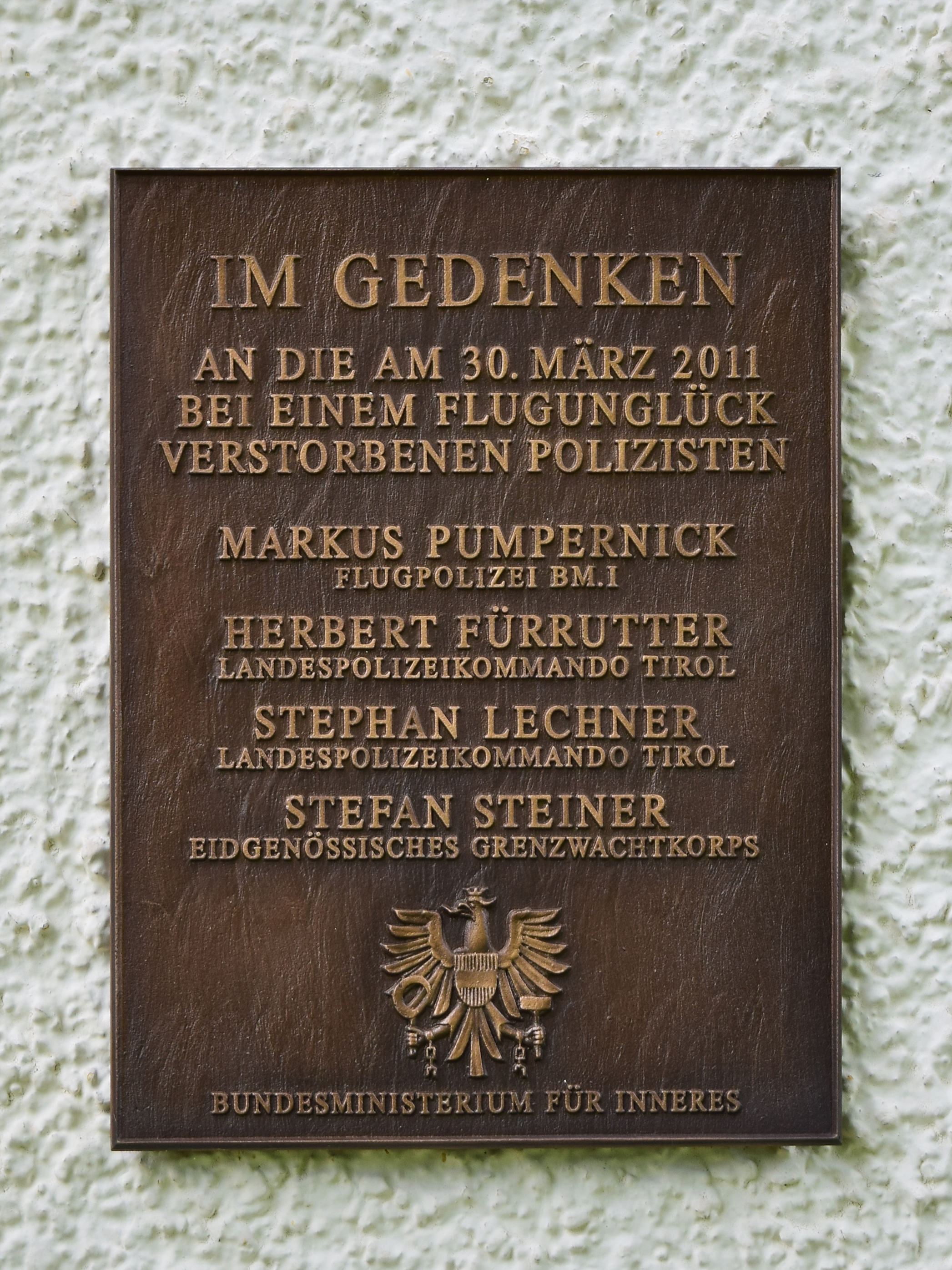 Die Gedenktafel für vier bei einem Flugunglück am 30. März 2011 umgekommene Polizisten befindet sich an der Seehofkapelle in Achenkirch.